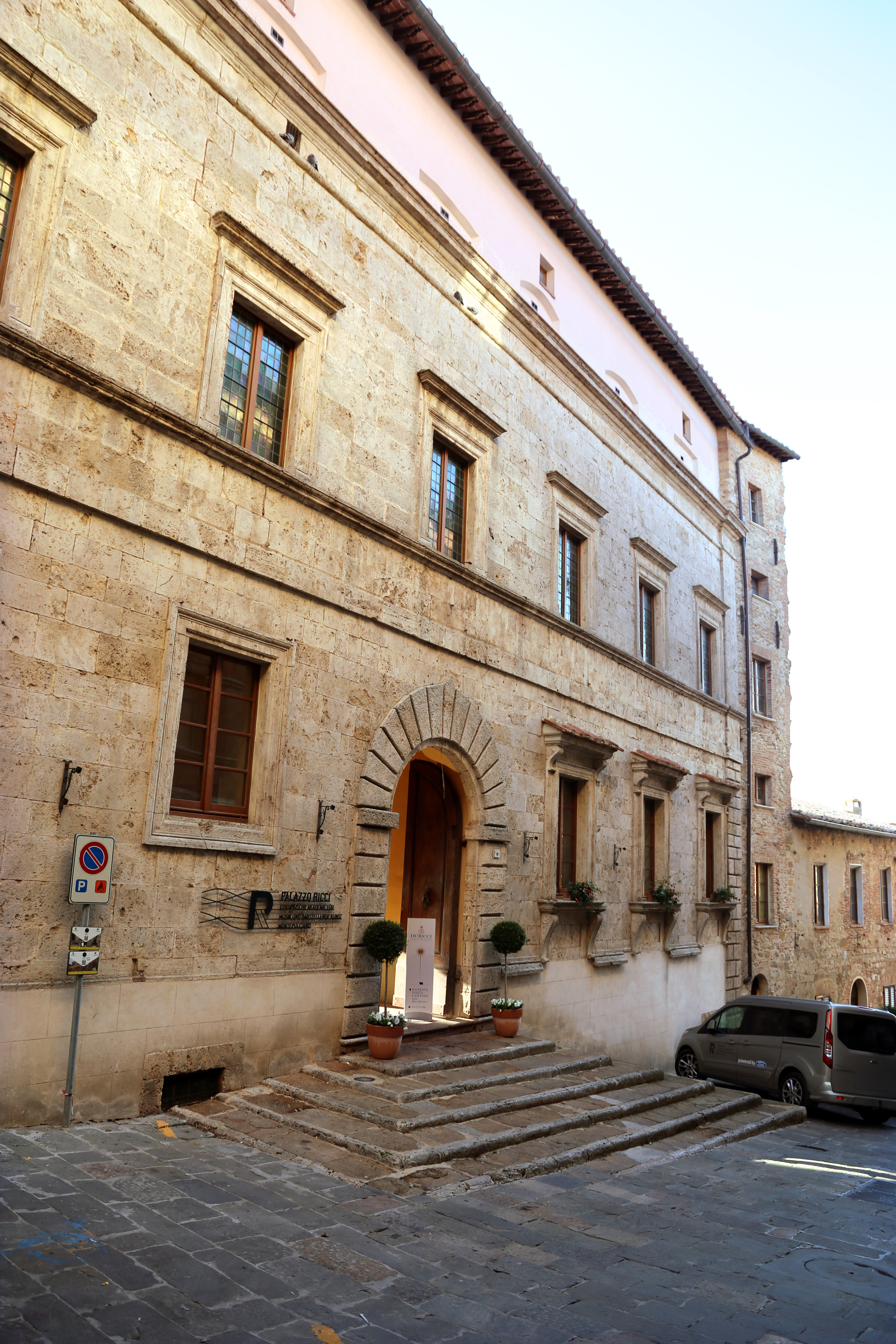 Palazzo Ricci This is a photo of a monument which is part of cultural heritage of Italy.